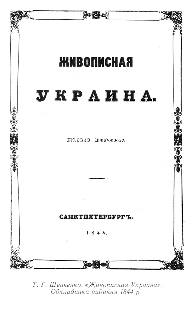 Обкладинка альбому офортів Т.Г. Шевченка